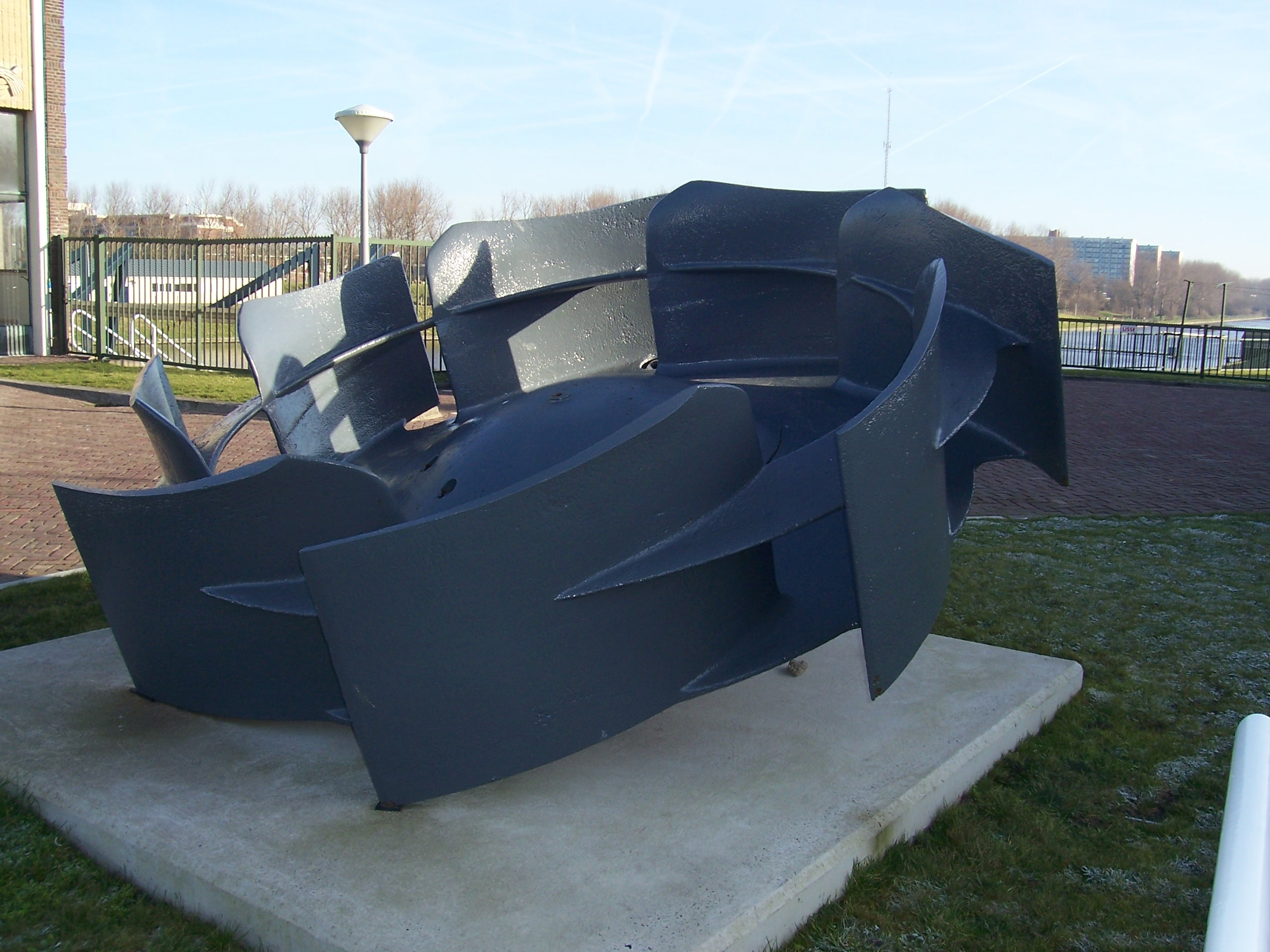 Voormalige pompwaaier van Koning Willem-Alexander Gemaal, voorheen naamloos (gemaal Katwijk).